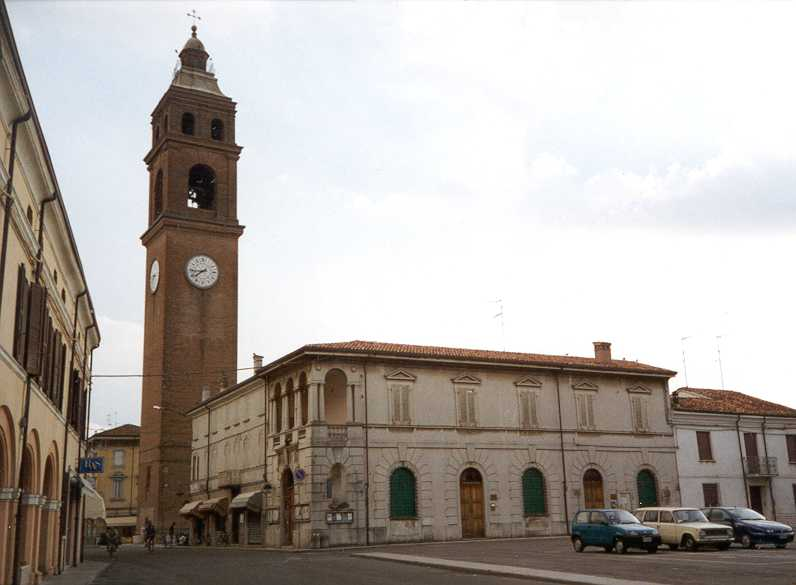 Luzzara, Piazza Enrico Toti, vista della Torre Civica